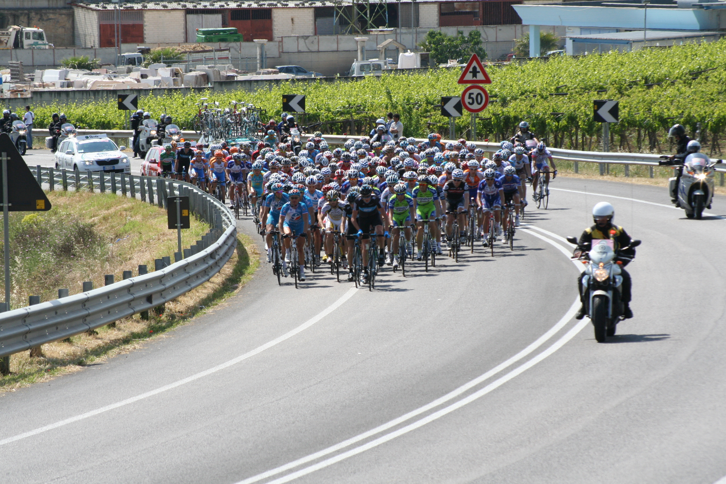 Giro d'Italia a Canosa